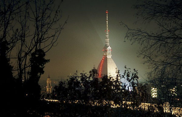 Torino, Mole Antonelliana, (Italy).